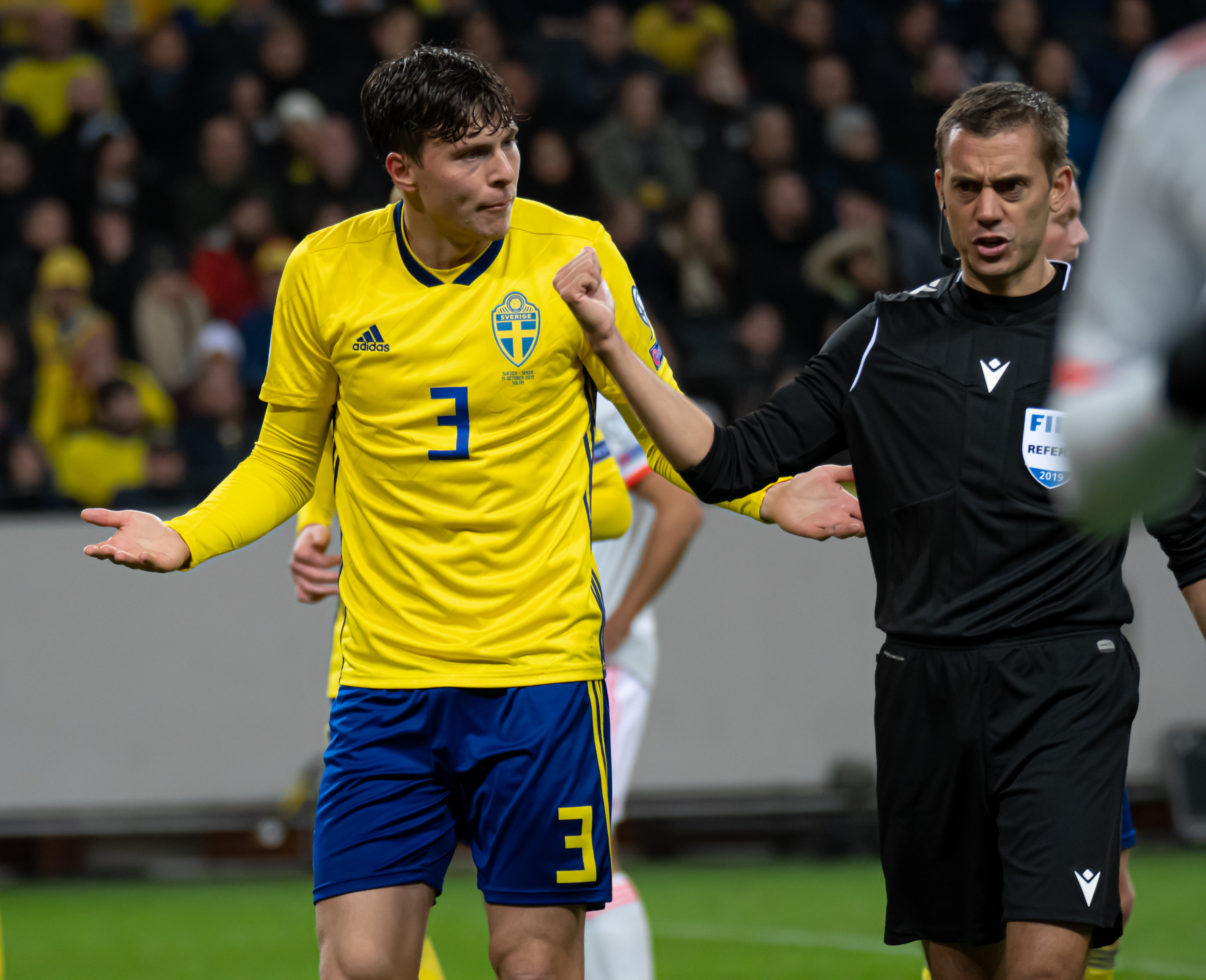 UEFA EURO qualifiers Sweden vs Spain 20191015